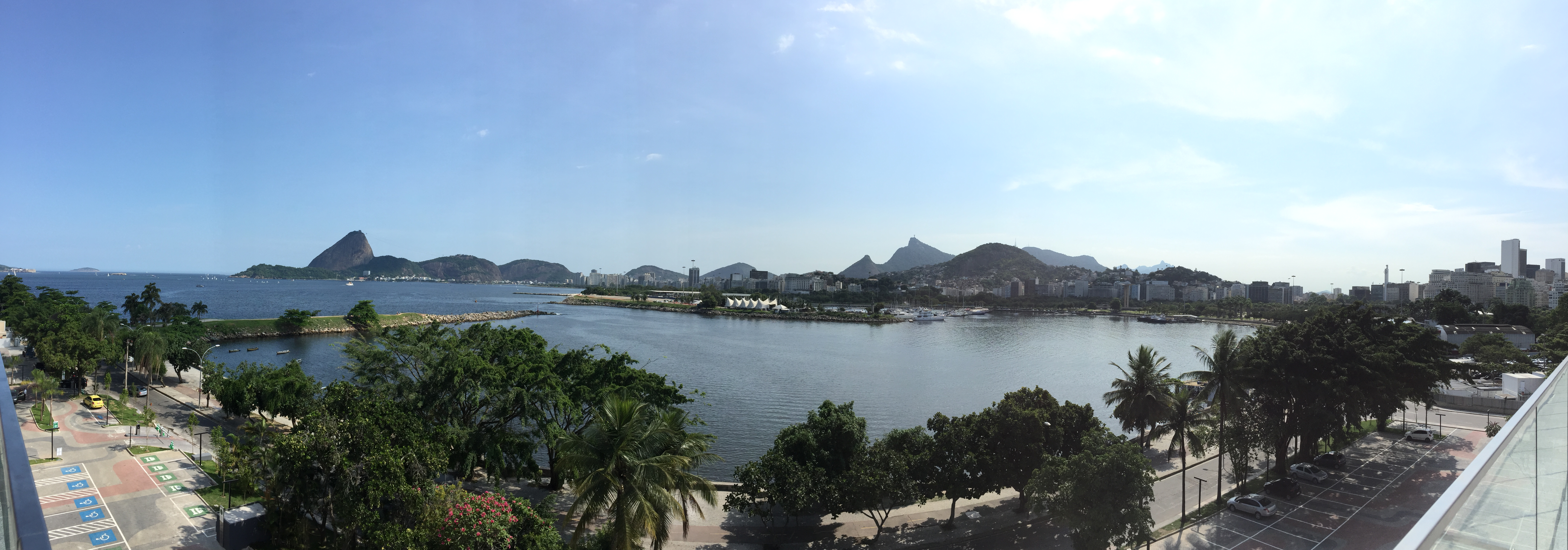 Panorama do bairro da Glória, no Rio de Janeiro, visto do terraço do Bossa Nova Mall.